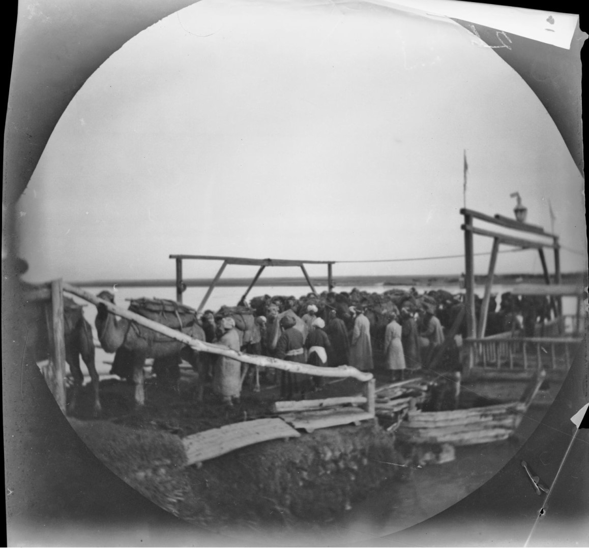 1891. Снимки Туркестана из альбома кругосветного путешествия на велосипедах Томаса Аллена